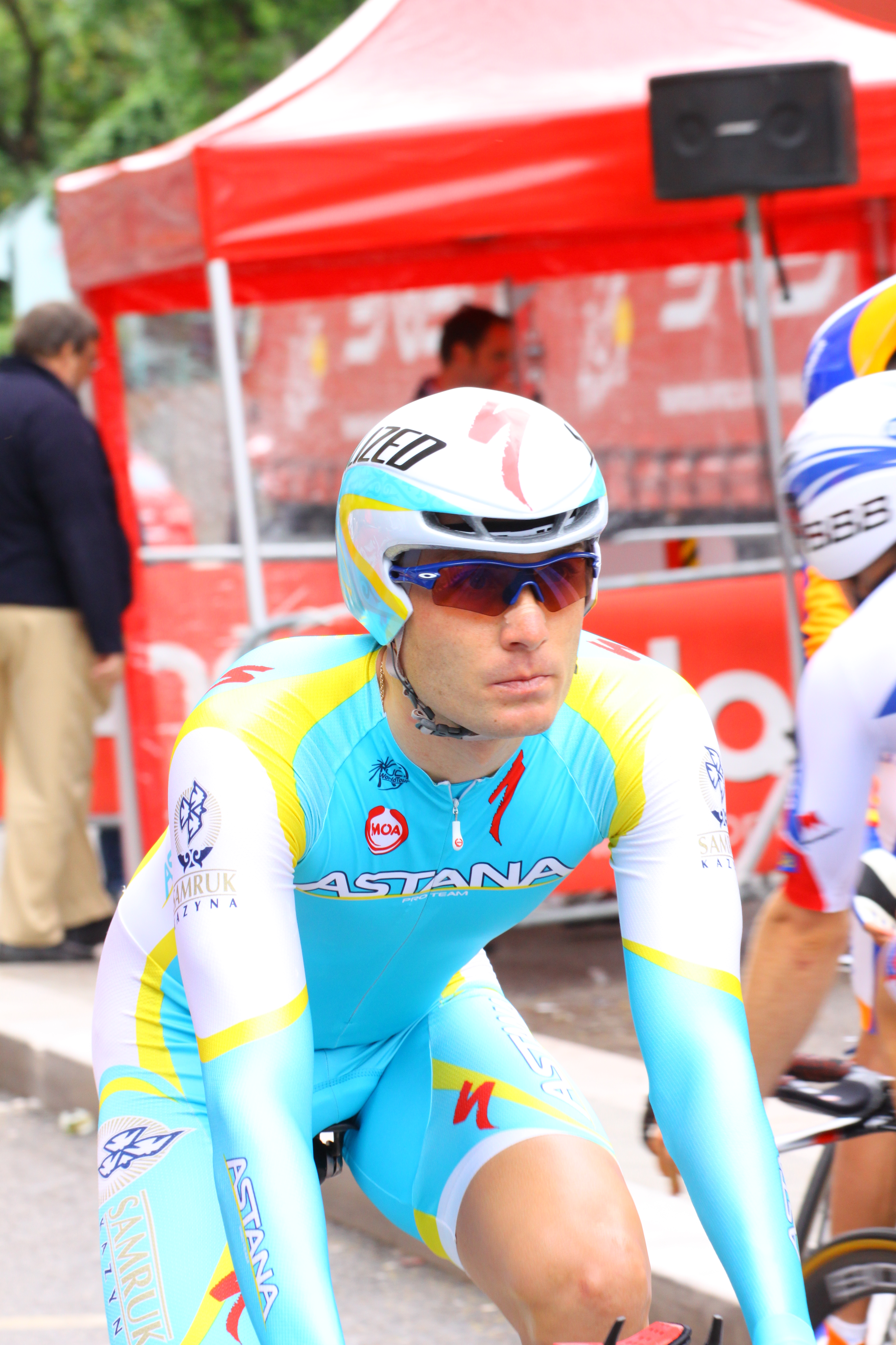 Andriy Grivko au départ du contre-la-montre du Critérium du Dauphiné 2011 à Grenoble